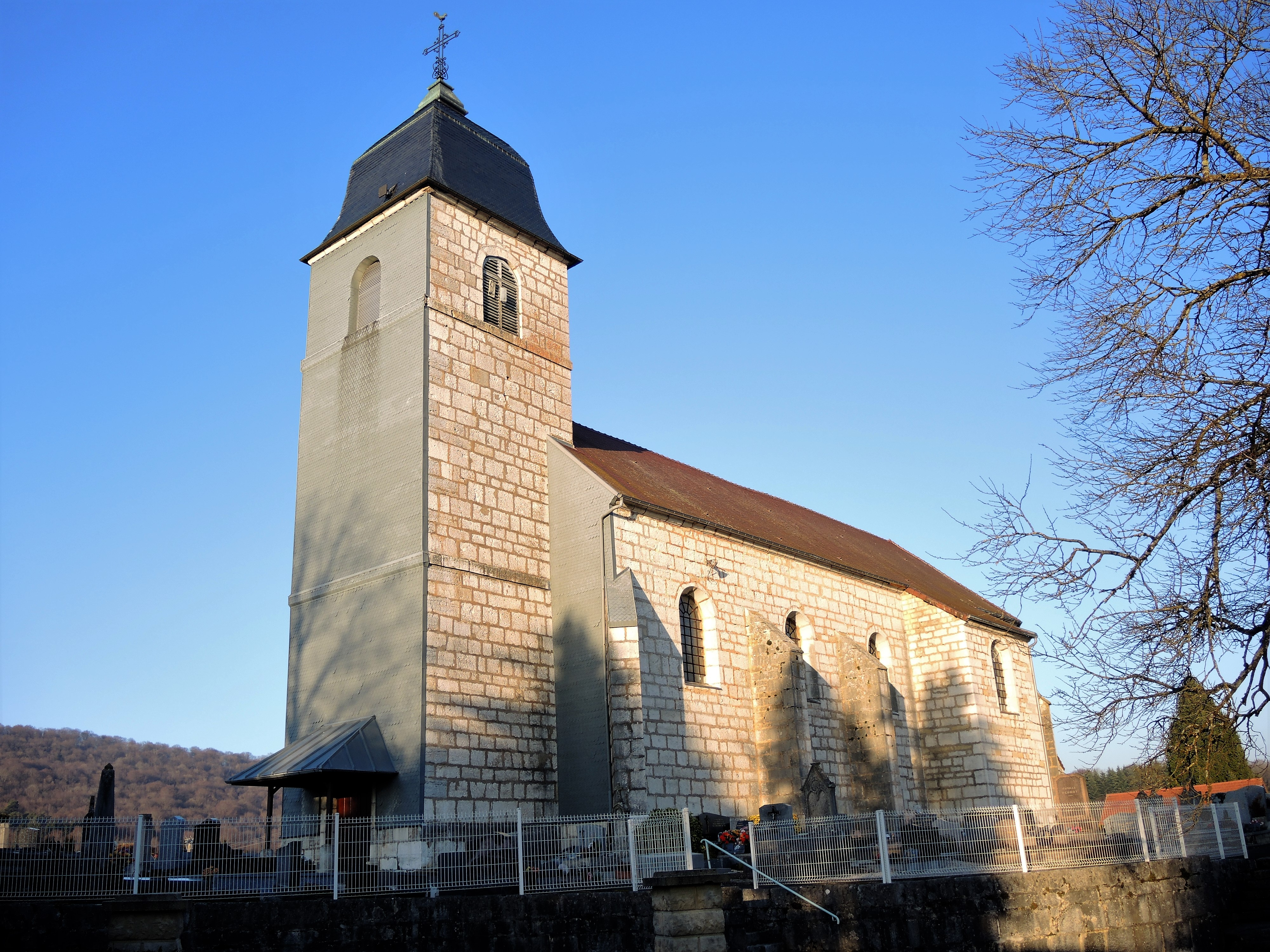 Eglise de Dammartin-les-Templiers. Doubs